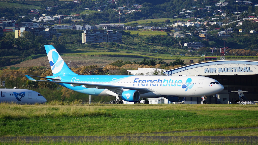 French Bee (anciennement French Blue)